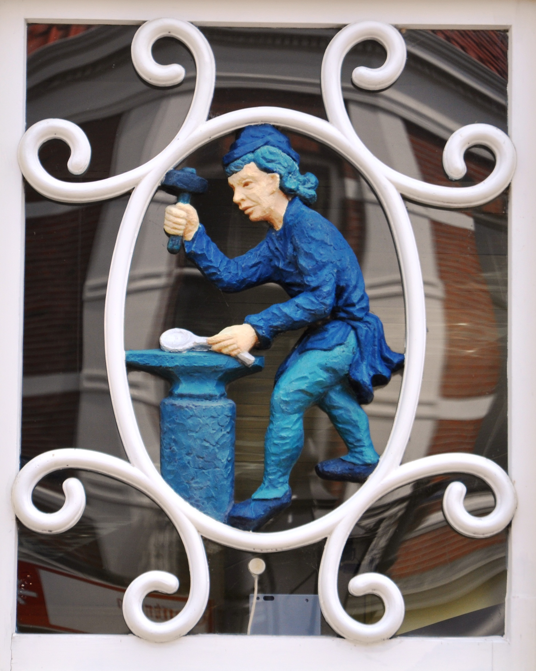 Bovenlicht in Schoonhoven, ornament geplaatst tussen 1965 en 1972.